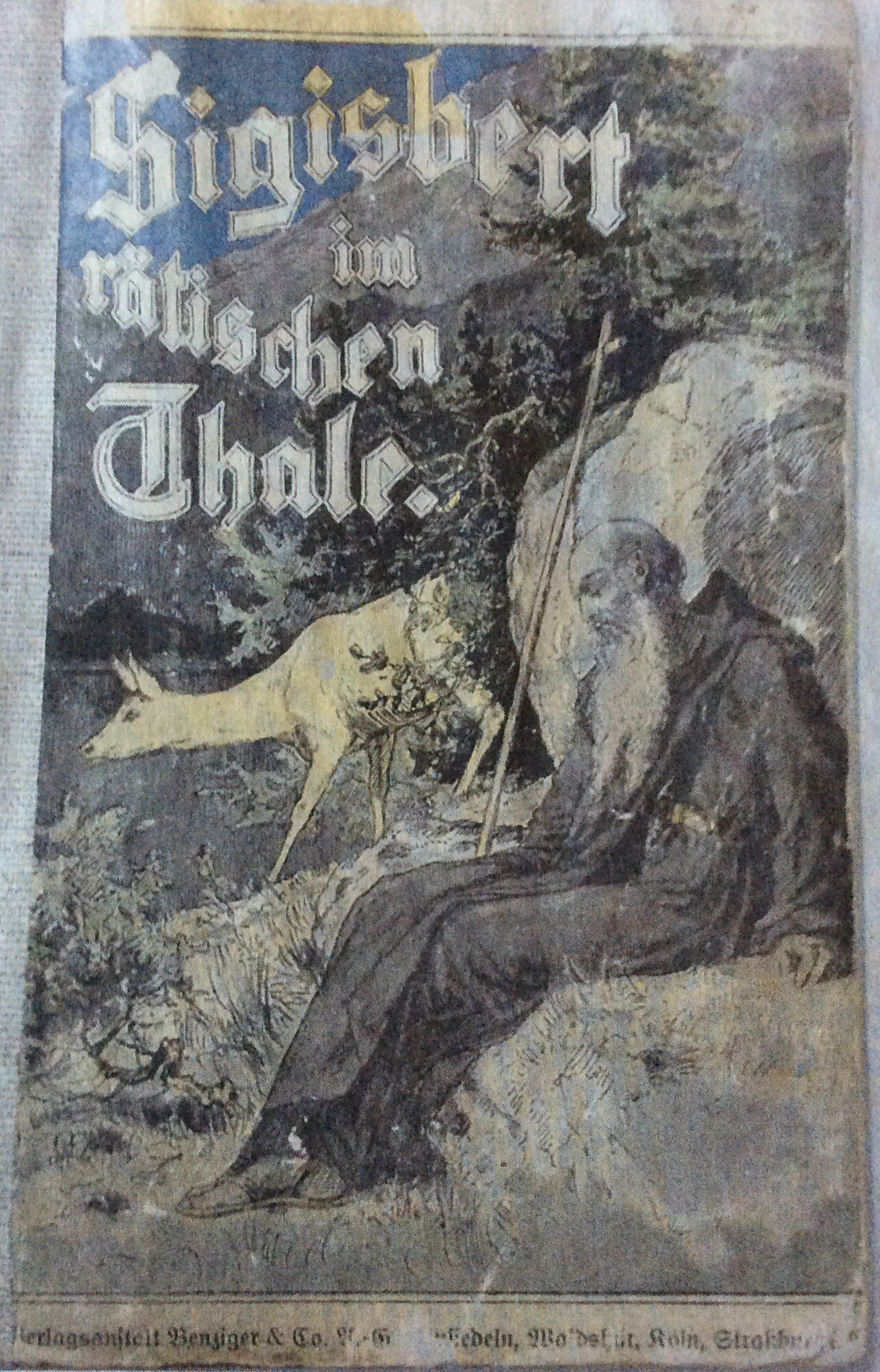 Sigisbert im rhätischen Thale, Buchtitelseite ca. 1890, aus Bündner Tagblatt vom 12. Mai 2014